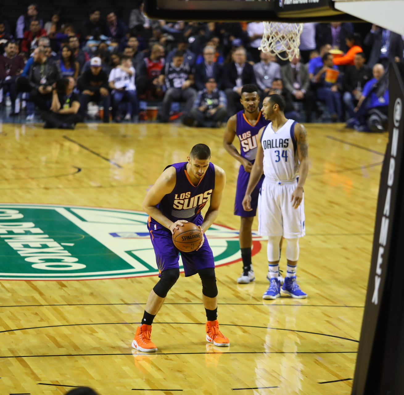 Partido NBA